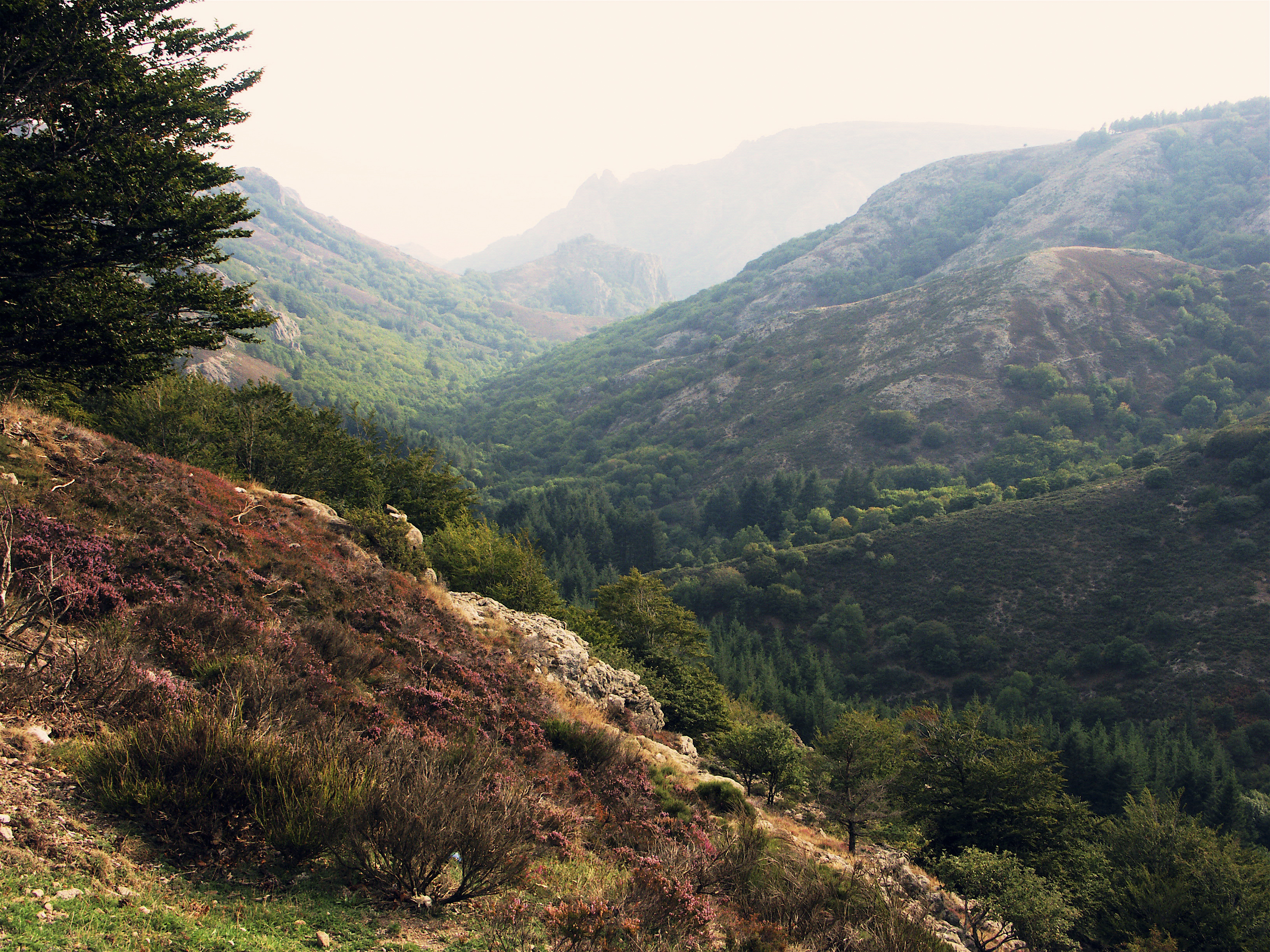 L'Espinouse à l'automne